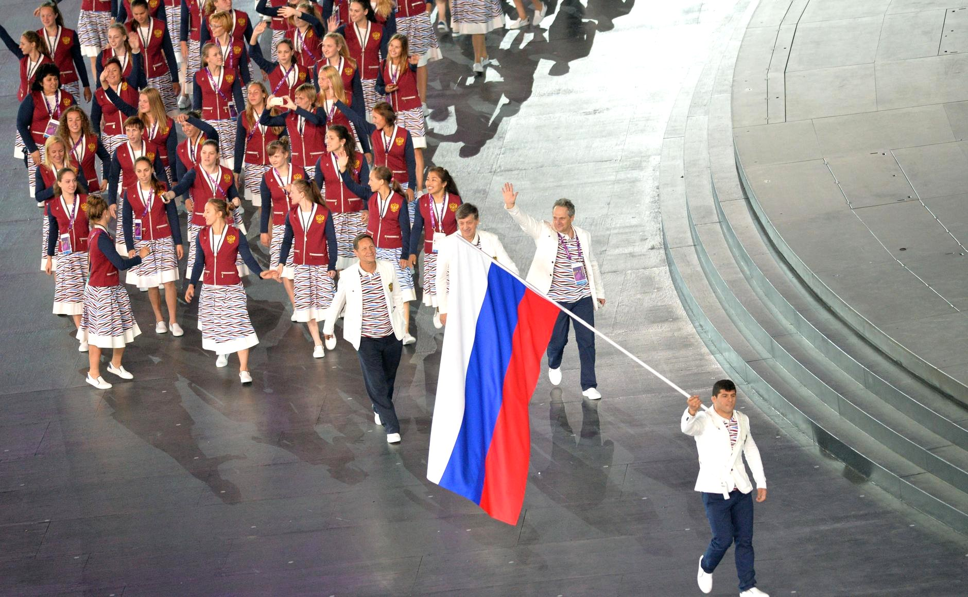 Российская сборная на церемонии открытия Первых Европейских игр в Баку. Знаменосец Хаджимурат Гацалов